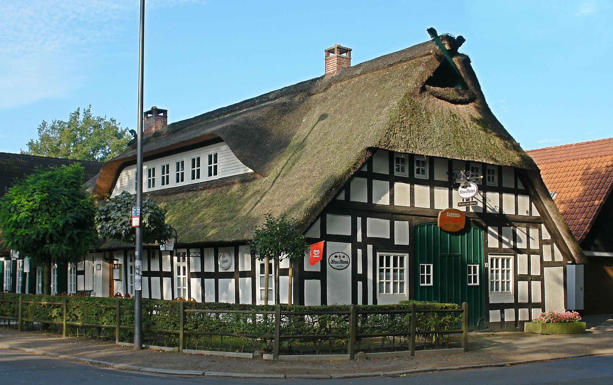 Gaststätte "Meyer am Boom" in Bremen, Oberneulander Landstraße 8.Das abgebildete Objekt ist ein geschütztes Kulturdenkmal in der Freien Hansestadt Bremen, mit der Nr. 0942 beim Landesamt für Denkmalpflege registriert.